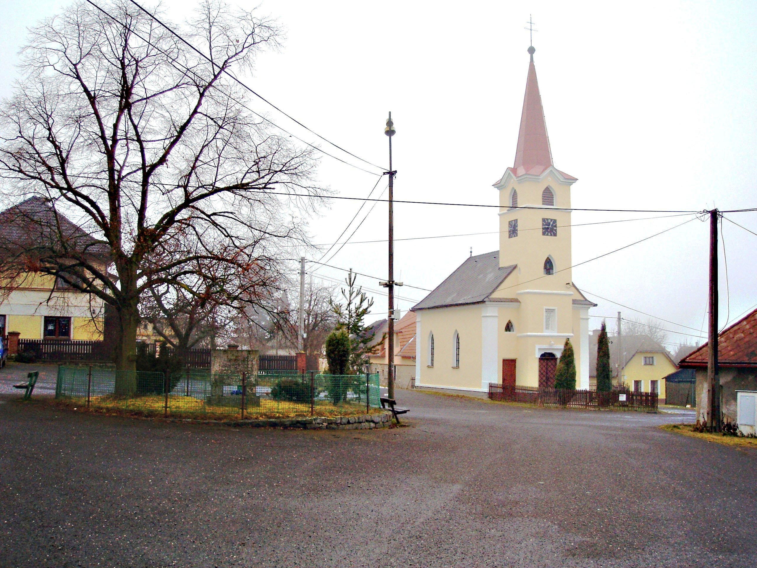 Voltuš - kaple Sv.Anny